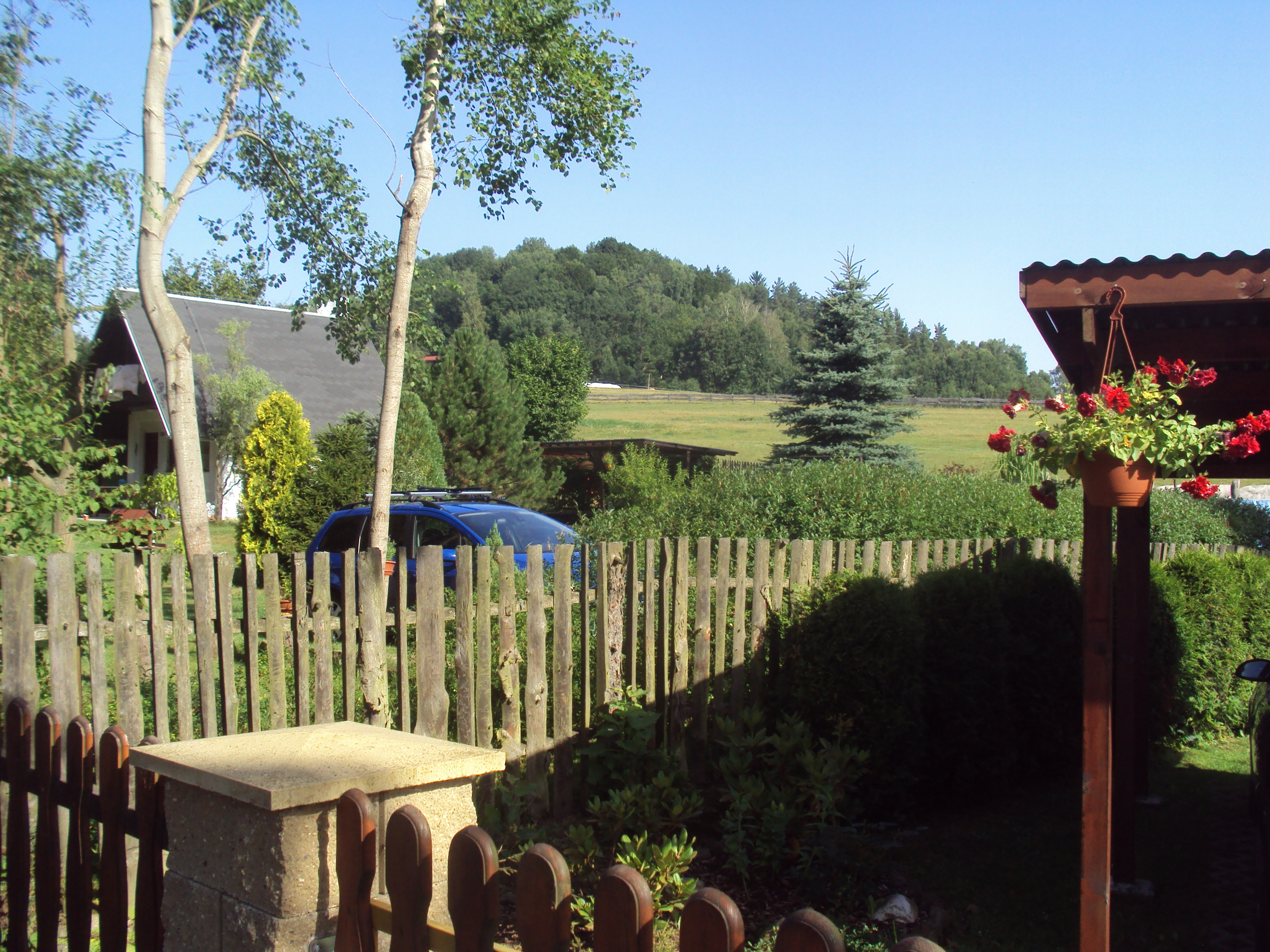 Pomahačův vrch 373 m z obce Radvanec